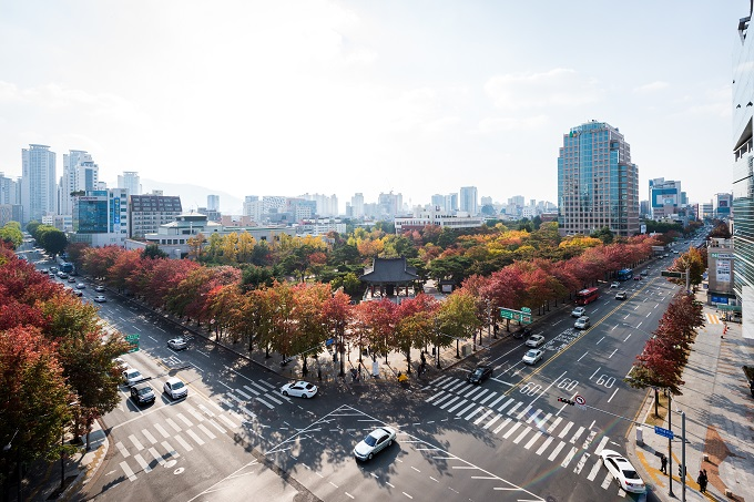 대구광역시 국채보상기념공원